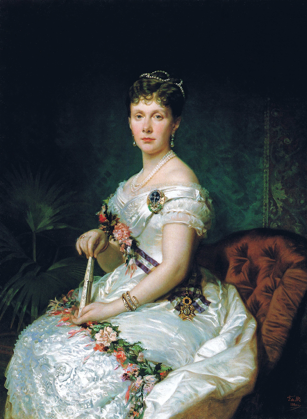 Retrato de Isabel de Borbón y Borbón (1851-1931), infanta de España e hija de la reina Isabel II de España y del rey Francisco de Asís de Borbón.